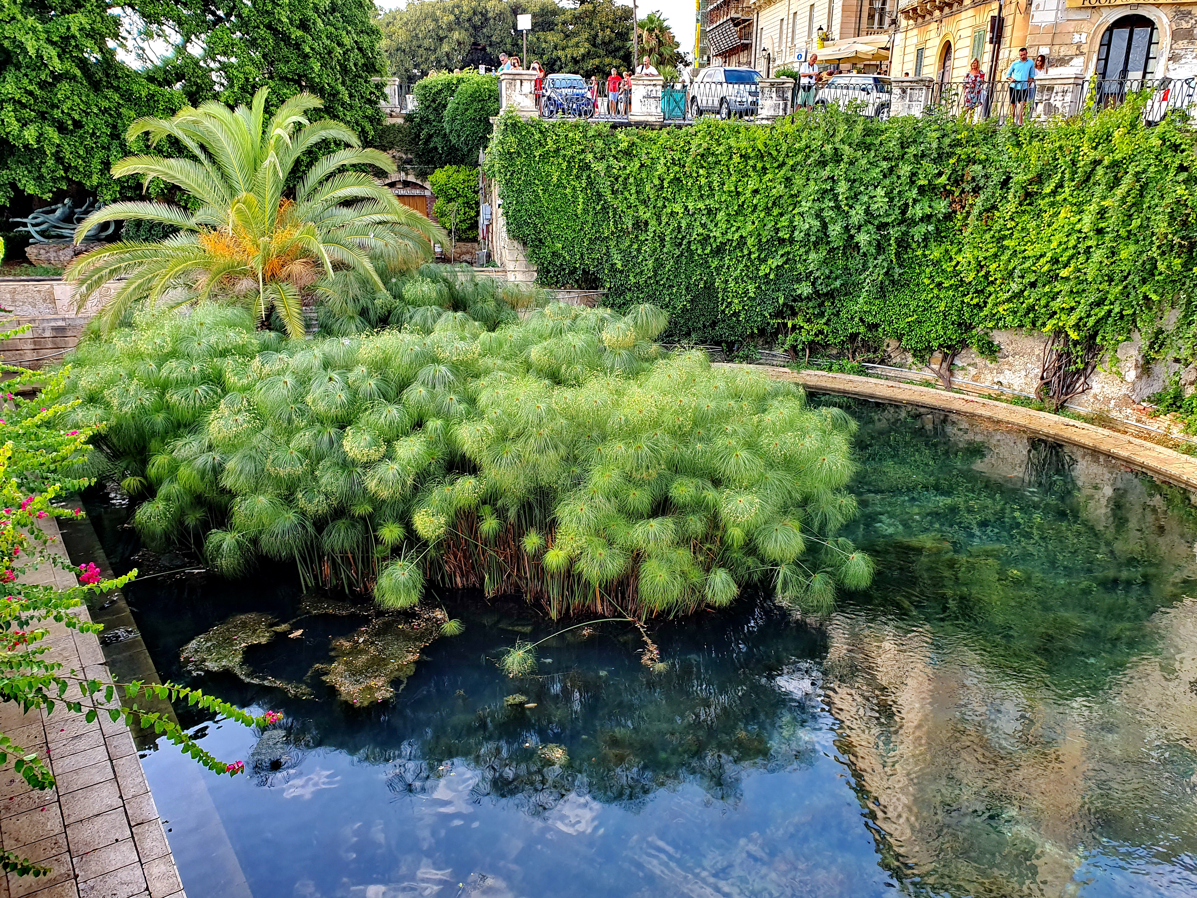 La Fonte Aretusa. Autore originale della foto Pascal POGGI.